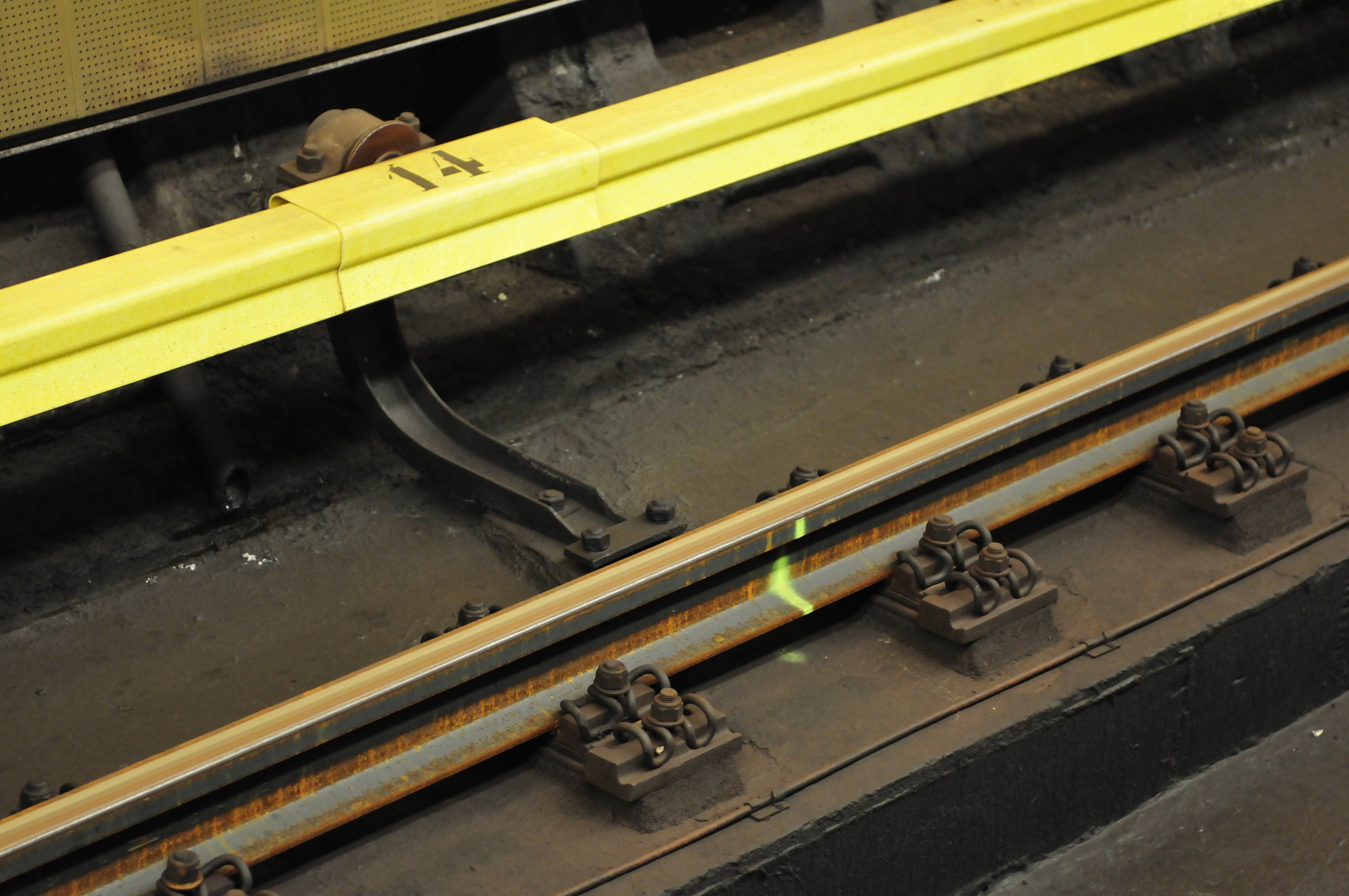 Metro Praha